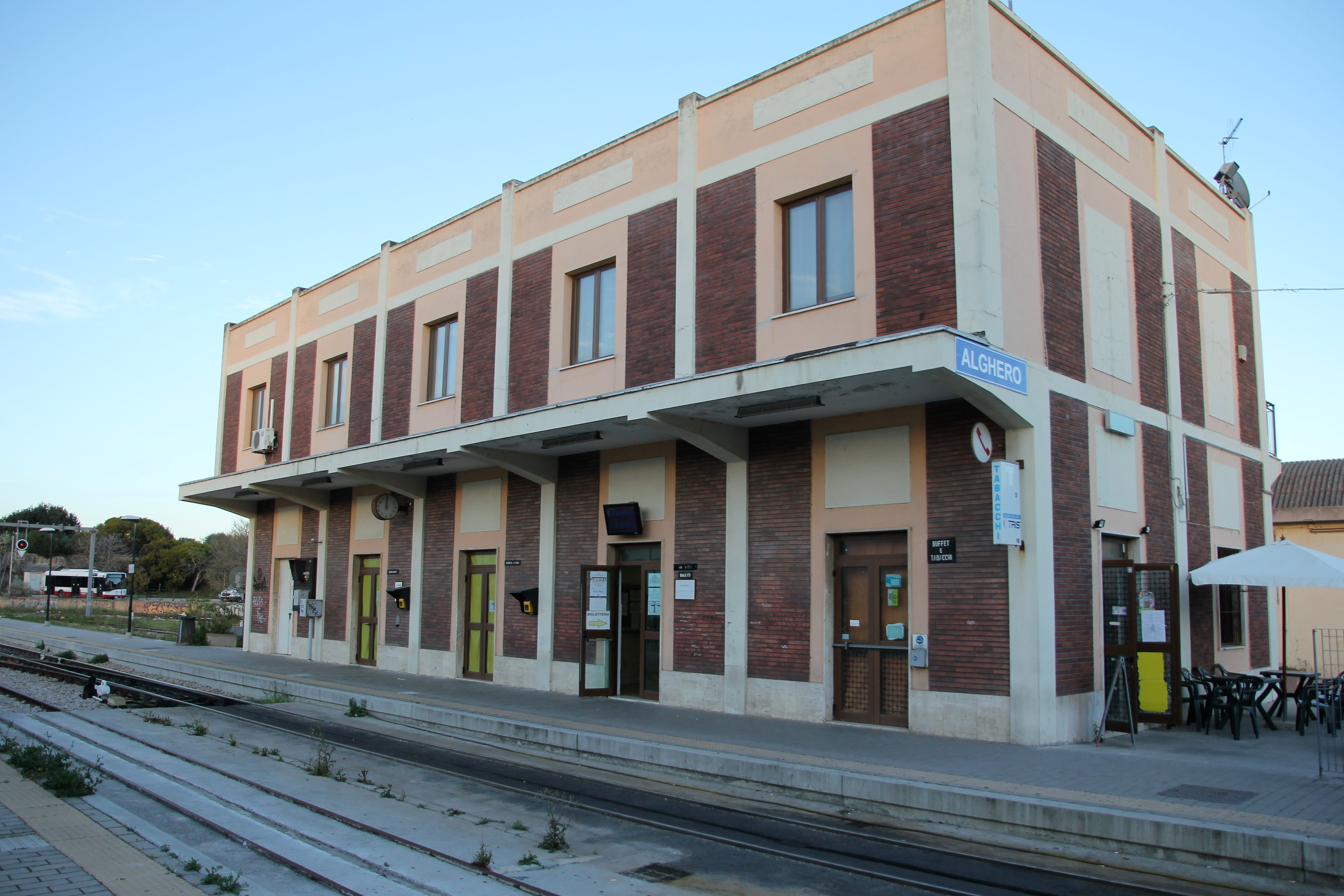 Alghero, stazione ferroviaria